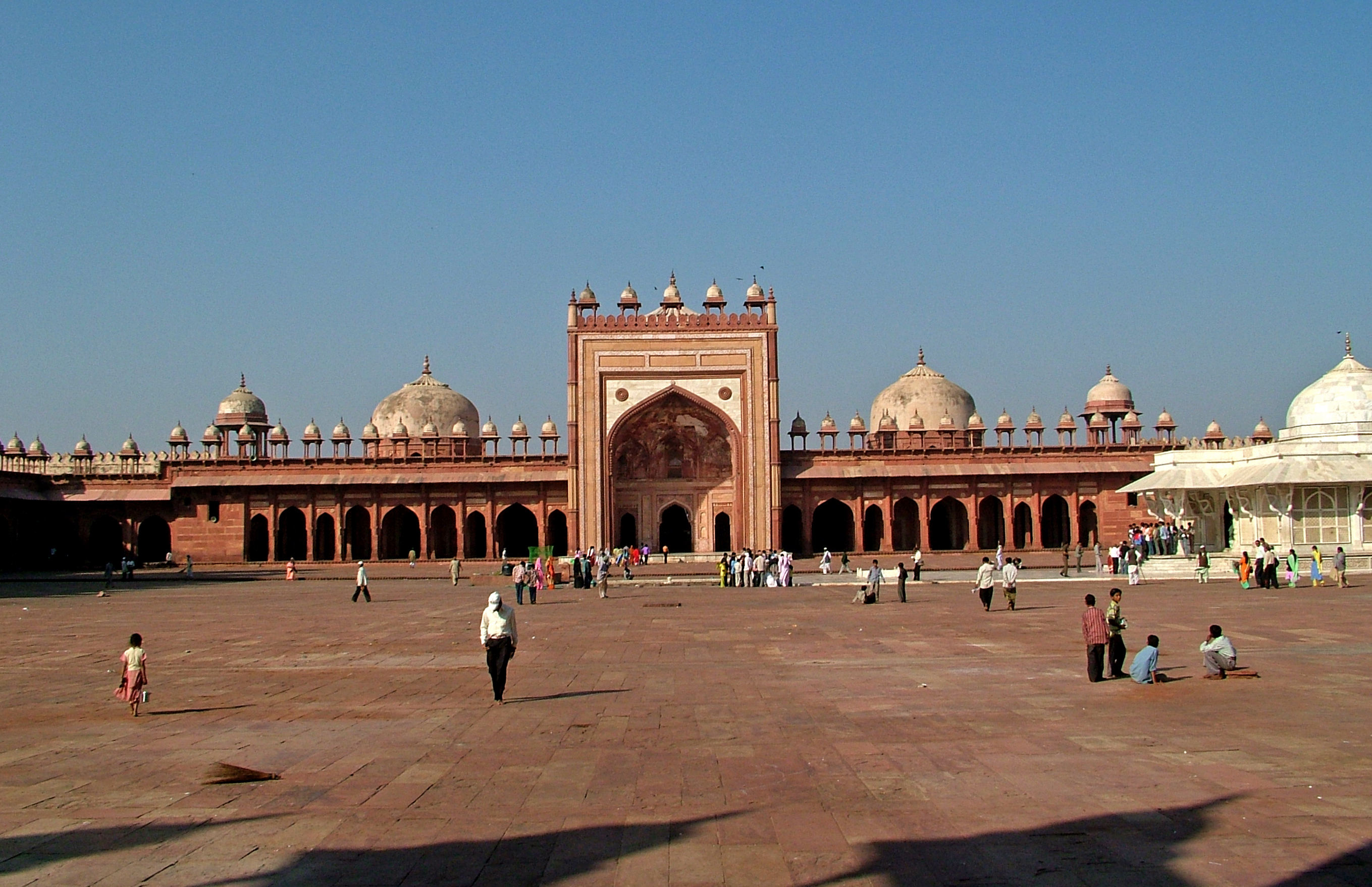 Mosque in Fatehpur Sikri